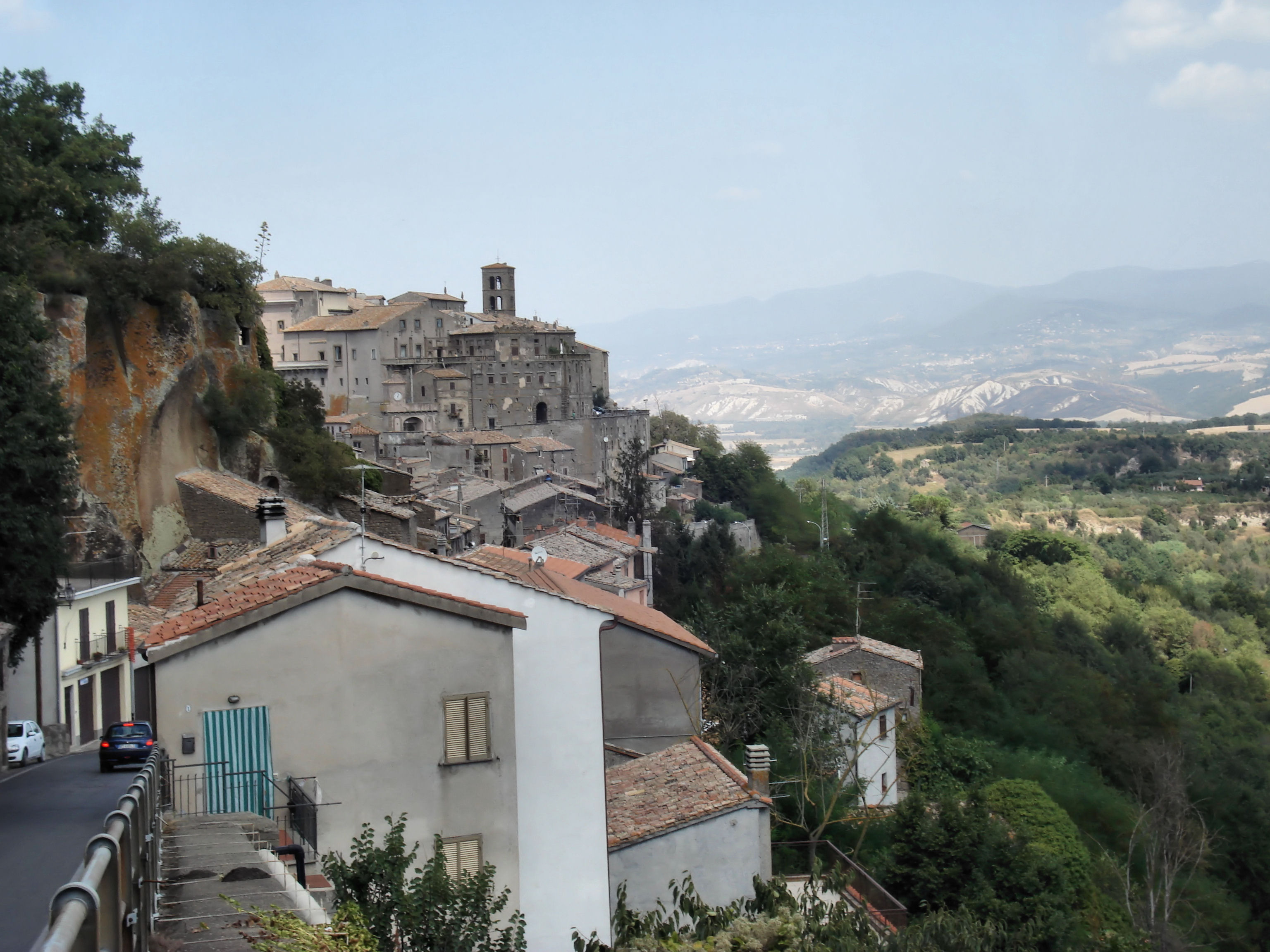 Bomarzo